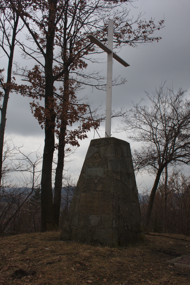 Krzyż Grunwaldzki na Czumowej Grapie w Milówce.